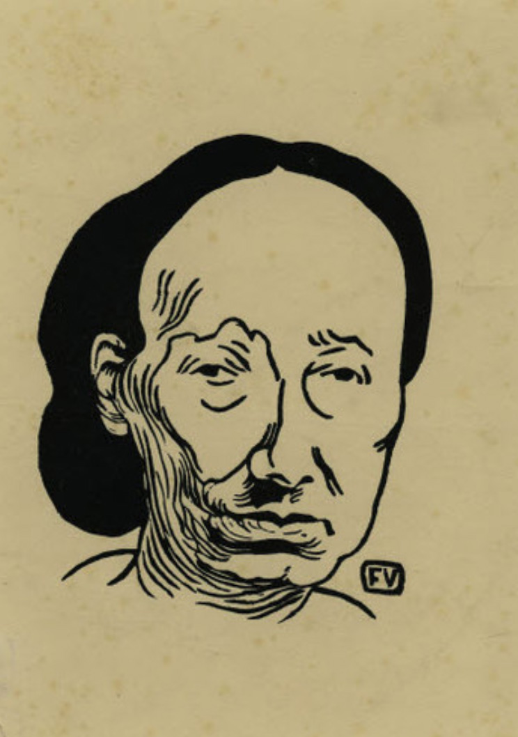 Louise Michel par Vallotton. N° d'inventaire : Cabinet d'arts graphiques du Musée d'art et d'histoire, Genève, Don Rainer Michael Mason, E 87-0121